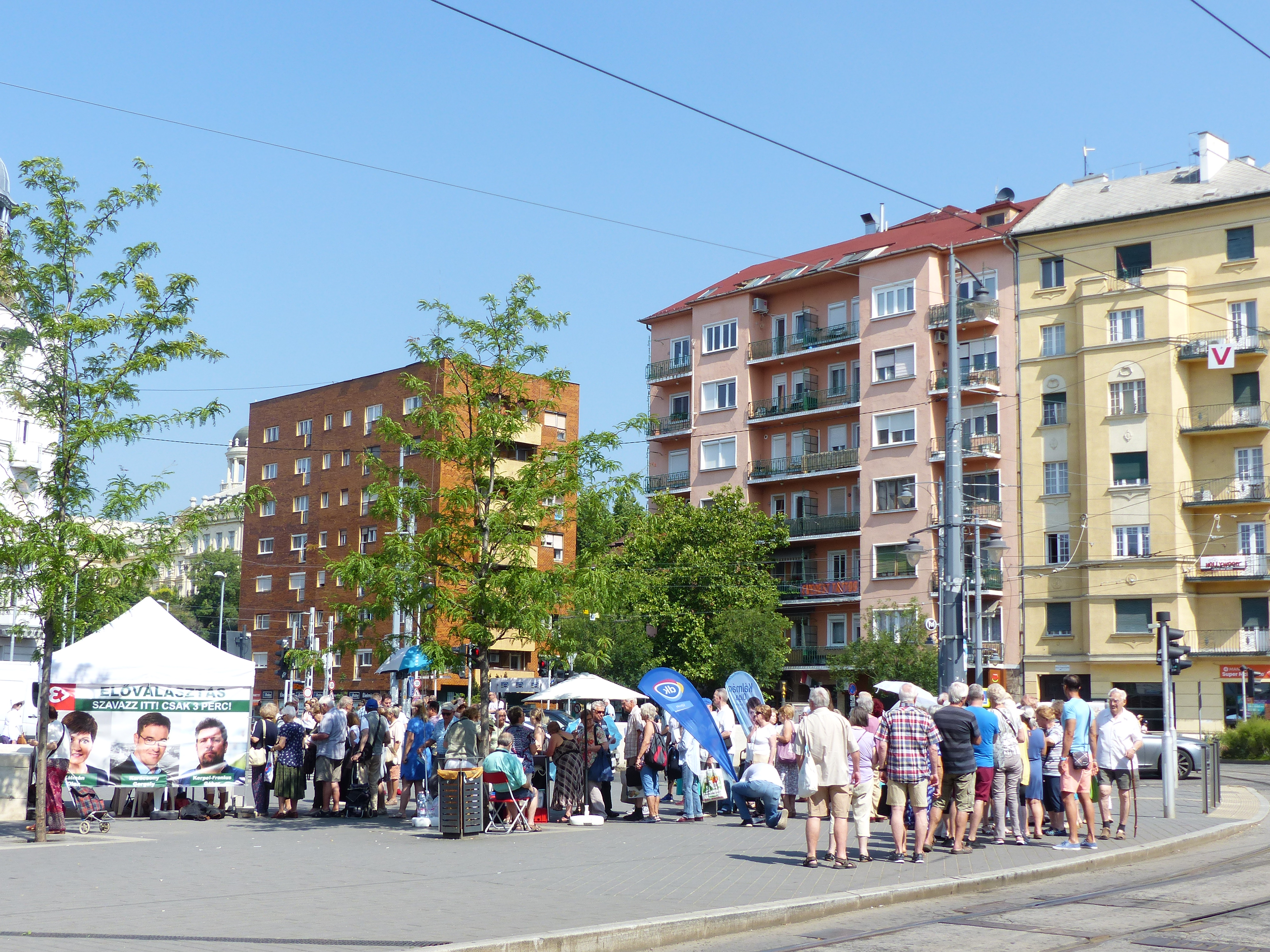 Előválasztás. A felvétel 2019. június 25-én, kedden készült a Móricz Zsigmond körtéren, Budapesten.